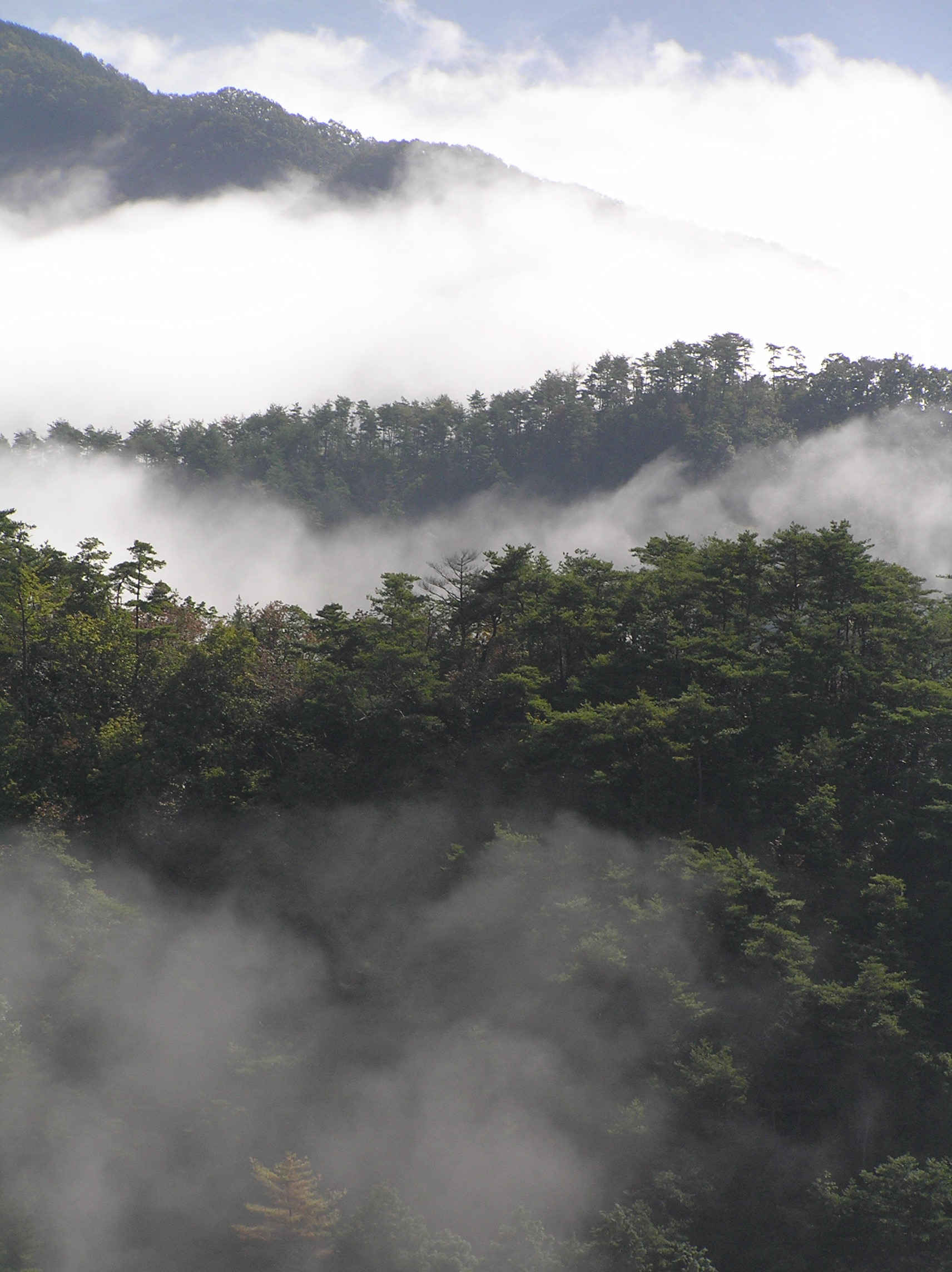 雲海 ～photo by Autumn Snake 【おぉたむ すねィく探検隊】写真部門 担当 大原佳苗